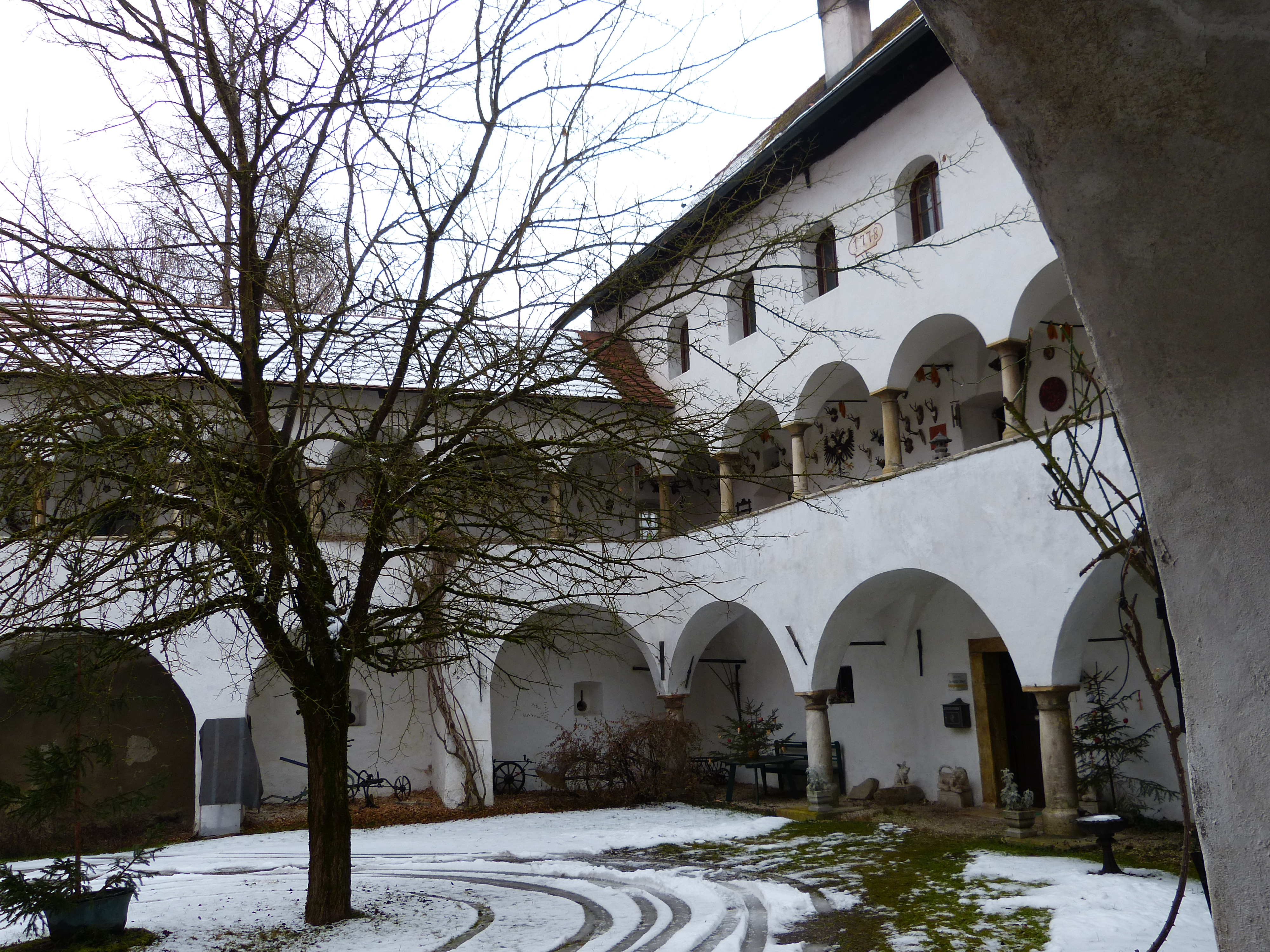 Schloss Weyer, Sankt Veit an der Glan: Südostecke des Arkadenhofs. An der Südseite Jahreszahl "1778".